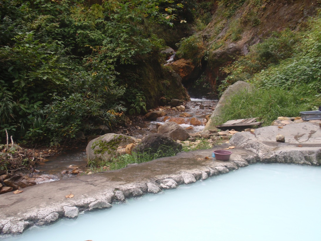 燕温泉の野湯、河原の湯